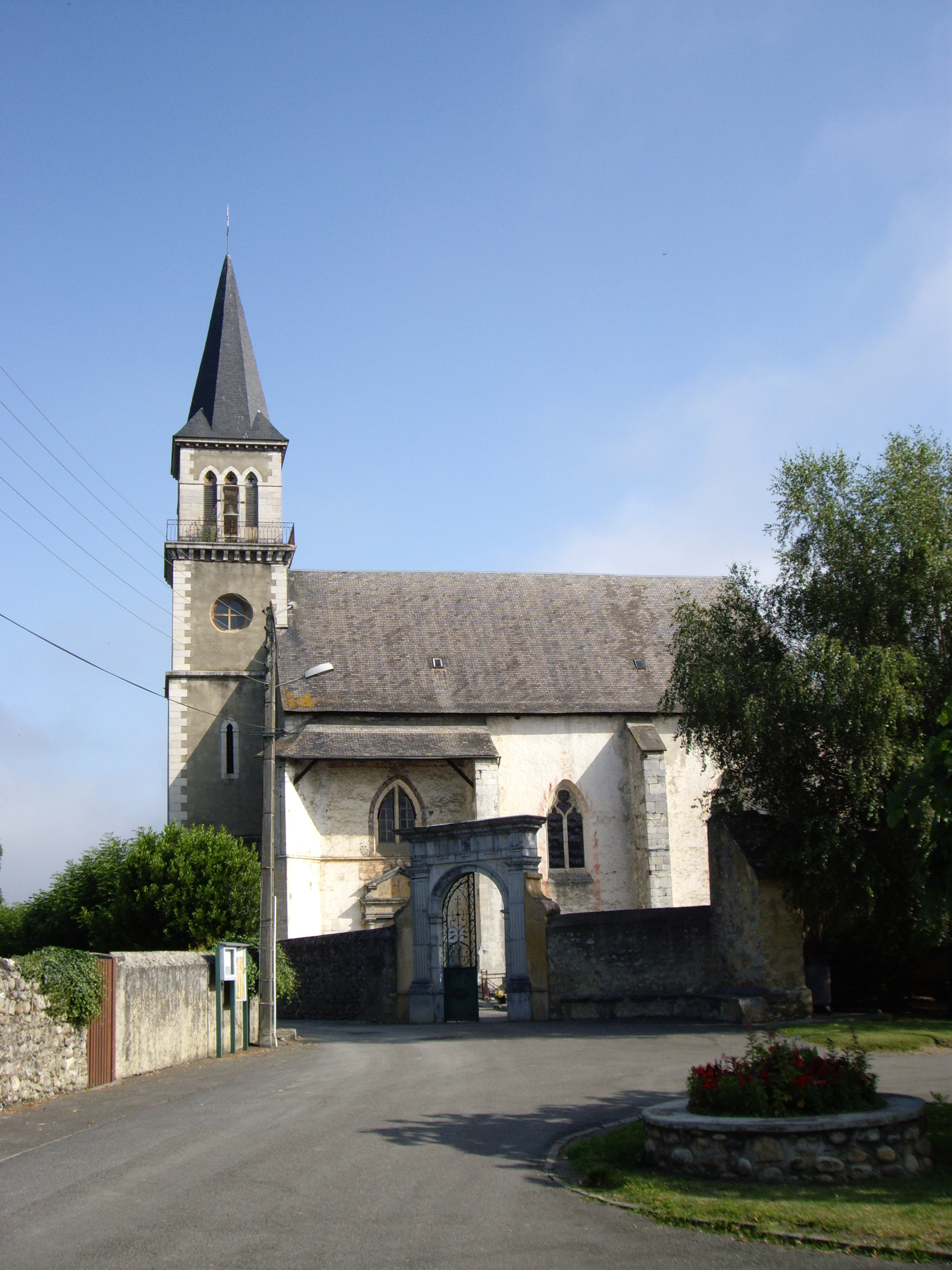 Église Saint-Saturnin de Pouzac (65)